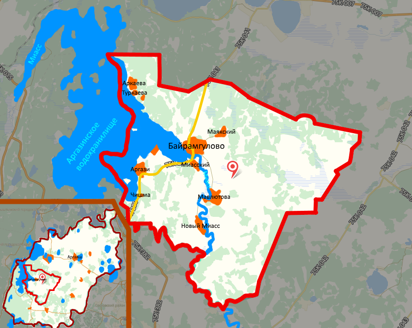 Карта сельского поселения Байрамгулово